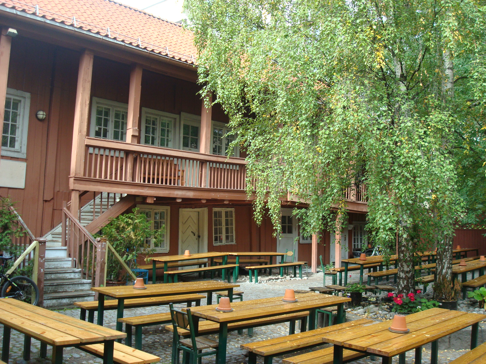 Asylet på Grønland i Oslo.